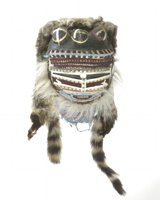 Het Makishi masker werd volgens Baumann (1935) bij de Chokwe alleen gebruikt in verband met de initiatierituelen voor jonge jongens die plaats vonden in het besnijdeniskamp. Reeds in circa 1880 werd het gebruikt bij meer profane gelegenheden. Nog altijd is er een strikt onderscheid tussen 'amusements' maskers en de eigenlijke, voor vrouwen bijzonder streng geheim gehouden besnijdenismaskers. In de eerste paar dagen werd door de maskerdrager de jongens in het besnijdeniskamp schrik aangejaagd. Daar legde hij het masker en pak in het bijzijn van de jongens af, en wisten de jongens dat hij geen gestorven familielid, maar een gewone dorpsgenoot was. Akishi betekent immers 'gestorven familieleden', maar ook 'maskerdrager'. Van nu af konden ze ook zelf maskerpakken dragen en vrouwen en kinderen schrik aanjagen. Ieder die besneden is kan een masker (laten) maken, maar hij is wel verplicht het Makishi-masker te maken dat in zijn familie gebruikelijk is. Hij noemt zelf de naam van de voorouder die hij voorstelt. Dit Makishi-masker behoort tot de Cizaluke of Tsizaluke maskers die een krankzinnige of nar voorstellen. White (1951) meldt dat de drie knobbels op de schedel wijzen op het feit dat het masker een oude dorpschief voorstelt. Vroeger werd dit masker voor het gezicht gedragen. In de jaren 70 van de twintigste eeuw werd het reeds op het voorhoofd gedragen, misschien om de 'Akishi' minder te belemmeren in de bewegingen van zijn hoofd.